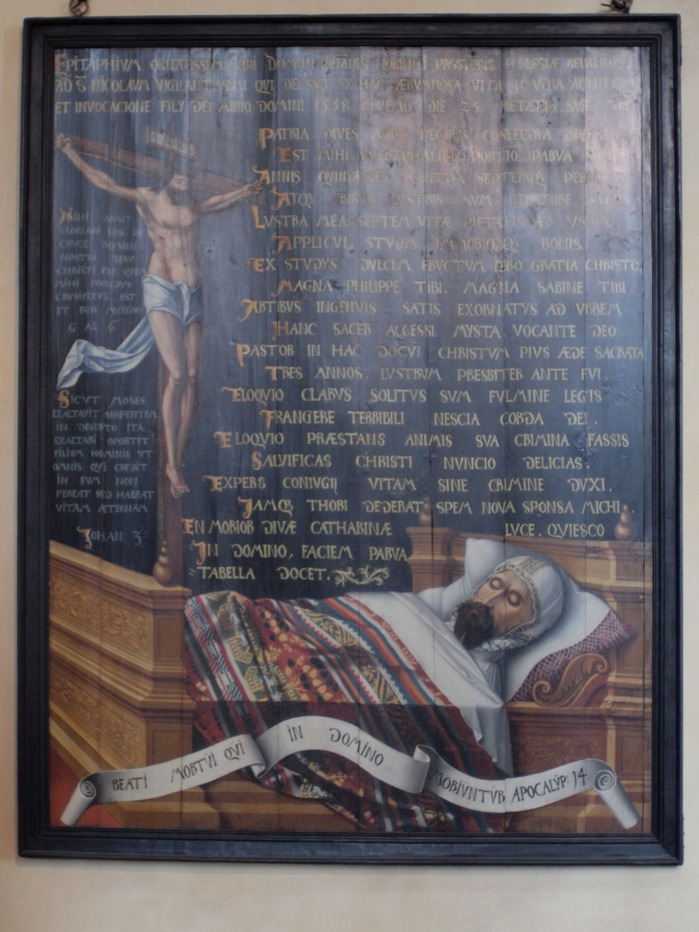 Johann Hobbingi epitaaf Niguliste kirikus